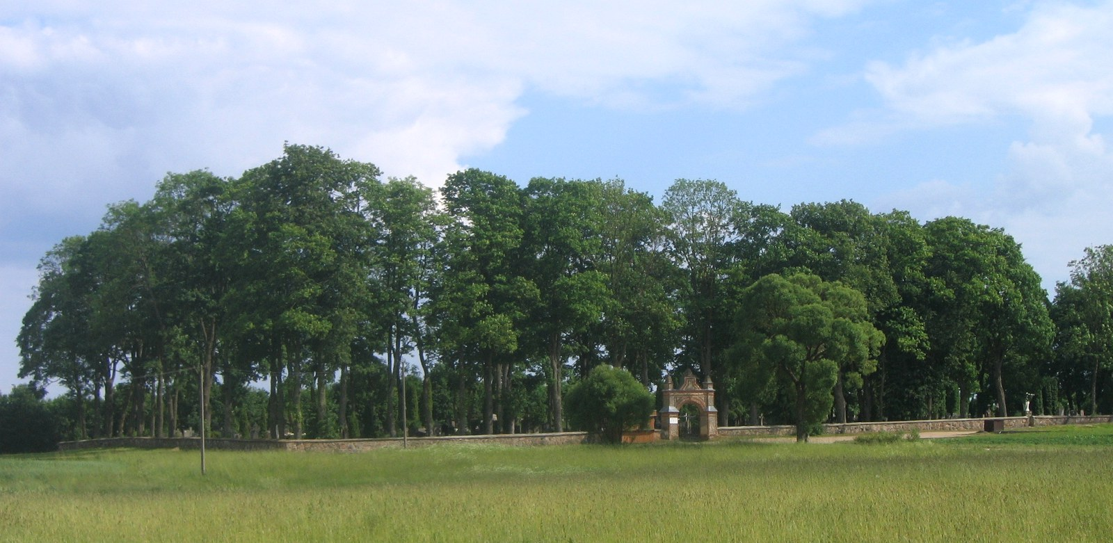 Autoriaus nuotrauka. 2006.06.25. Palėvenės kapinės